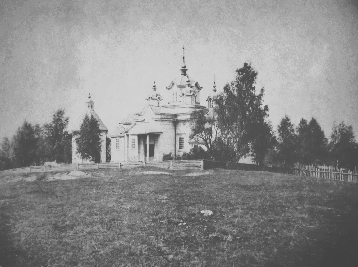 Беларуская (тарашкевіца): Цырын (Cyryn). Спаская царква